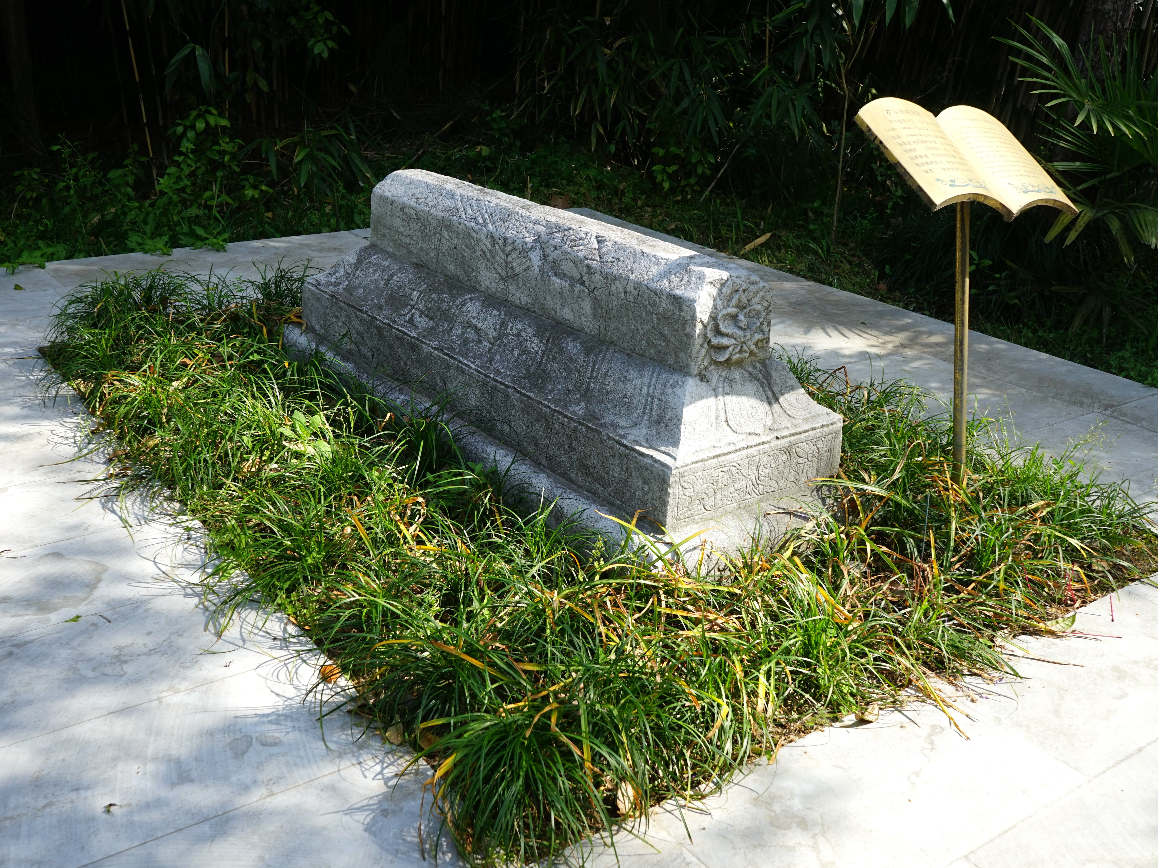 中文（中国大陆）: 左宝贵衣冠冢